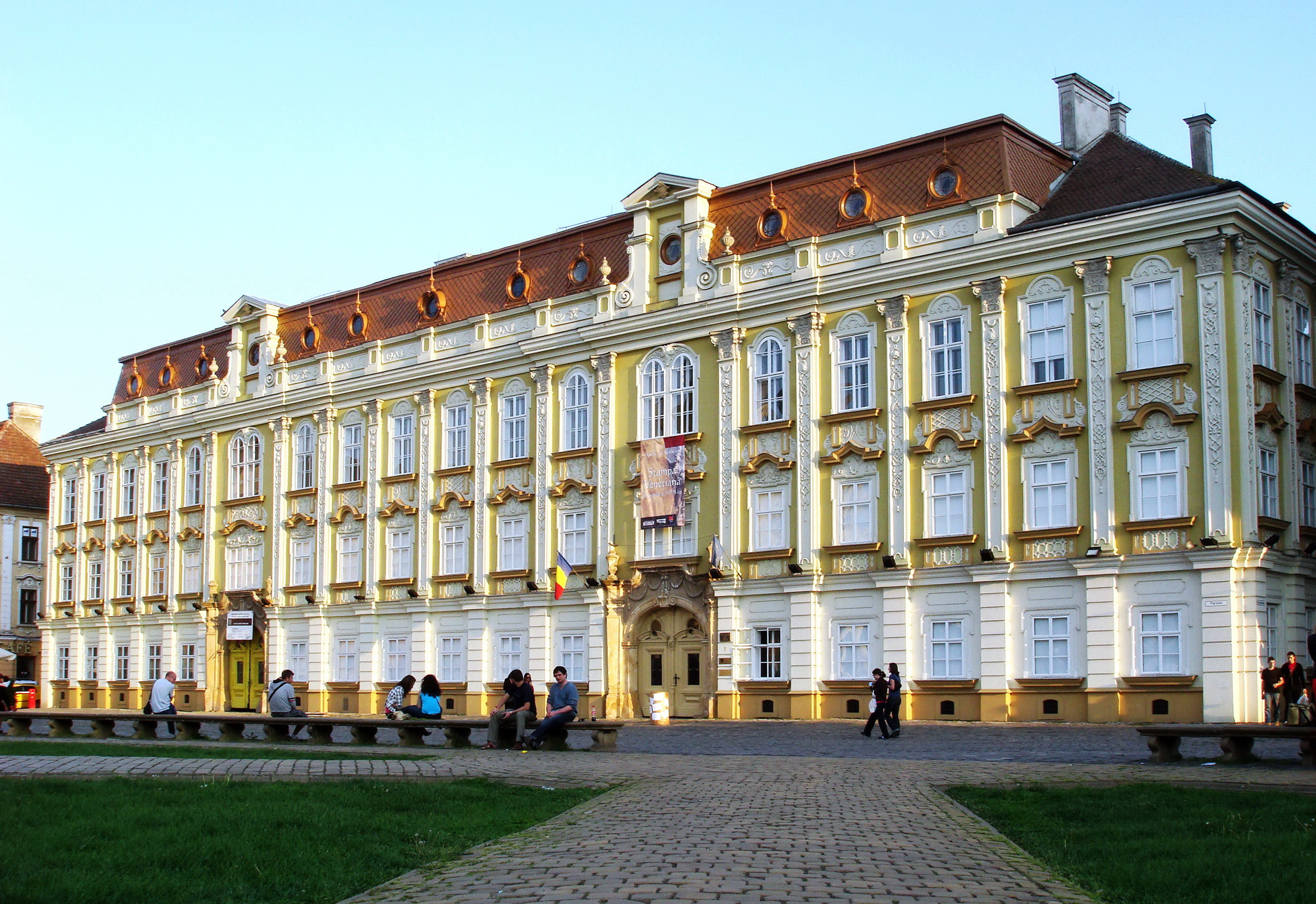 Palatul Baroc (Prefectura Veche) -azi Muzeul de Artă al Timişoarei, din Piaţa Unirii